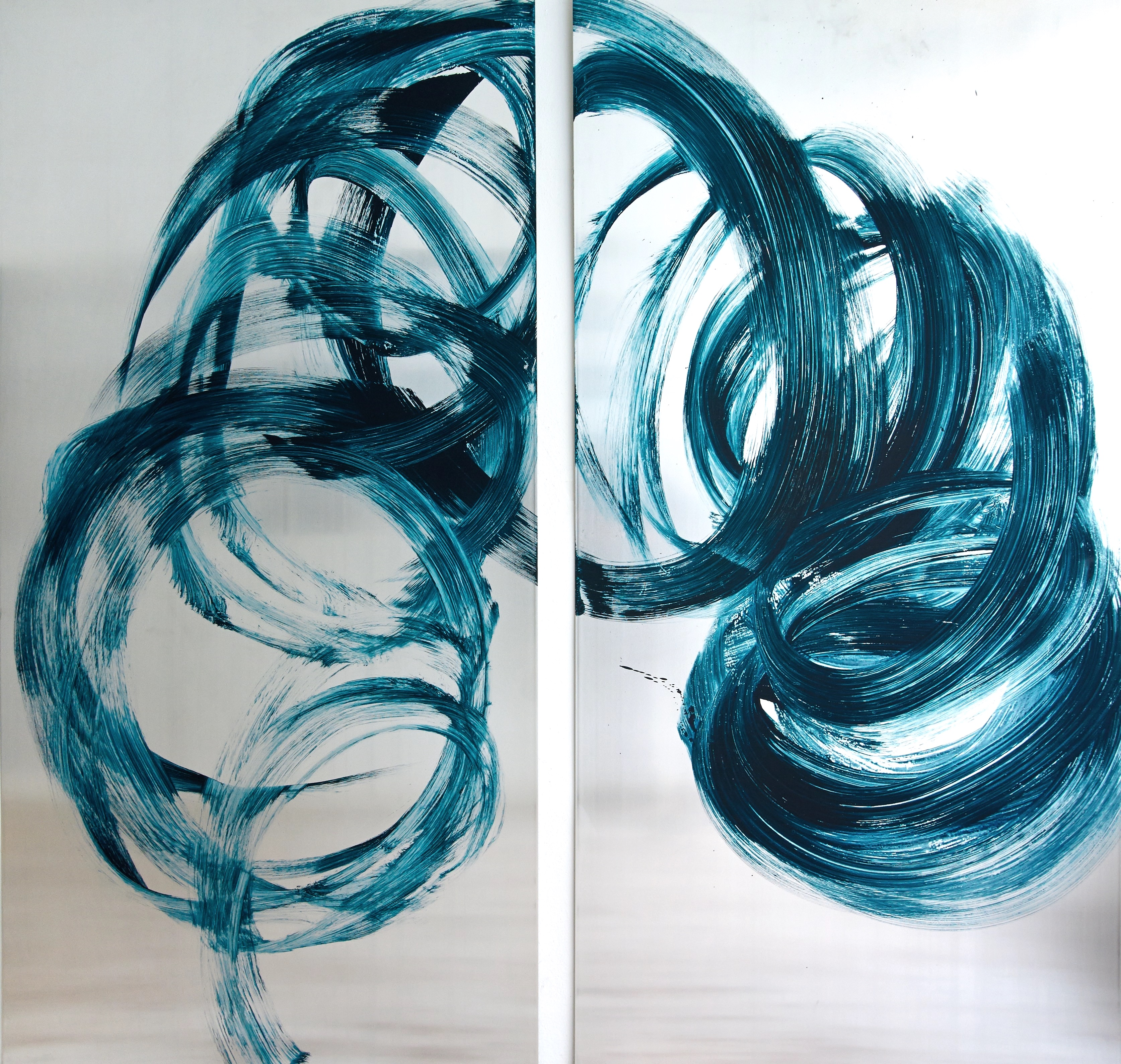 Asta von Unger, Power 02, Lack auf Aluminium, 2014, je 100x200cm